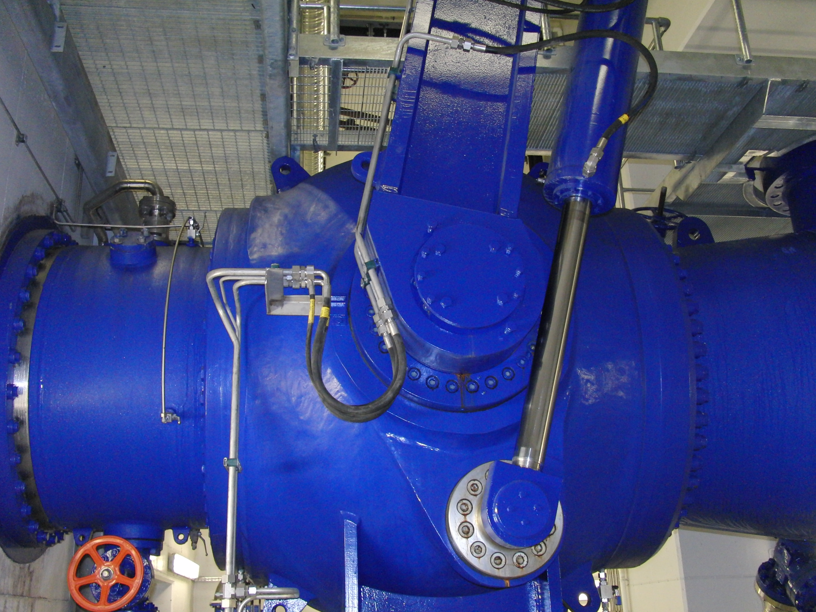 Kuleventil, Sønnå kraftverk